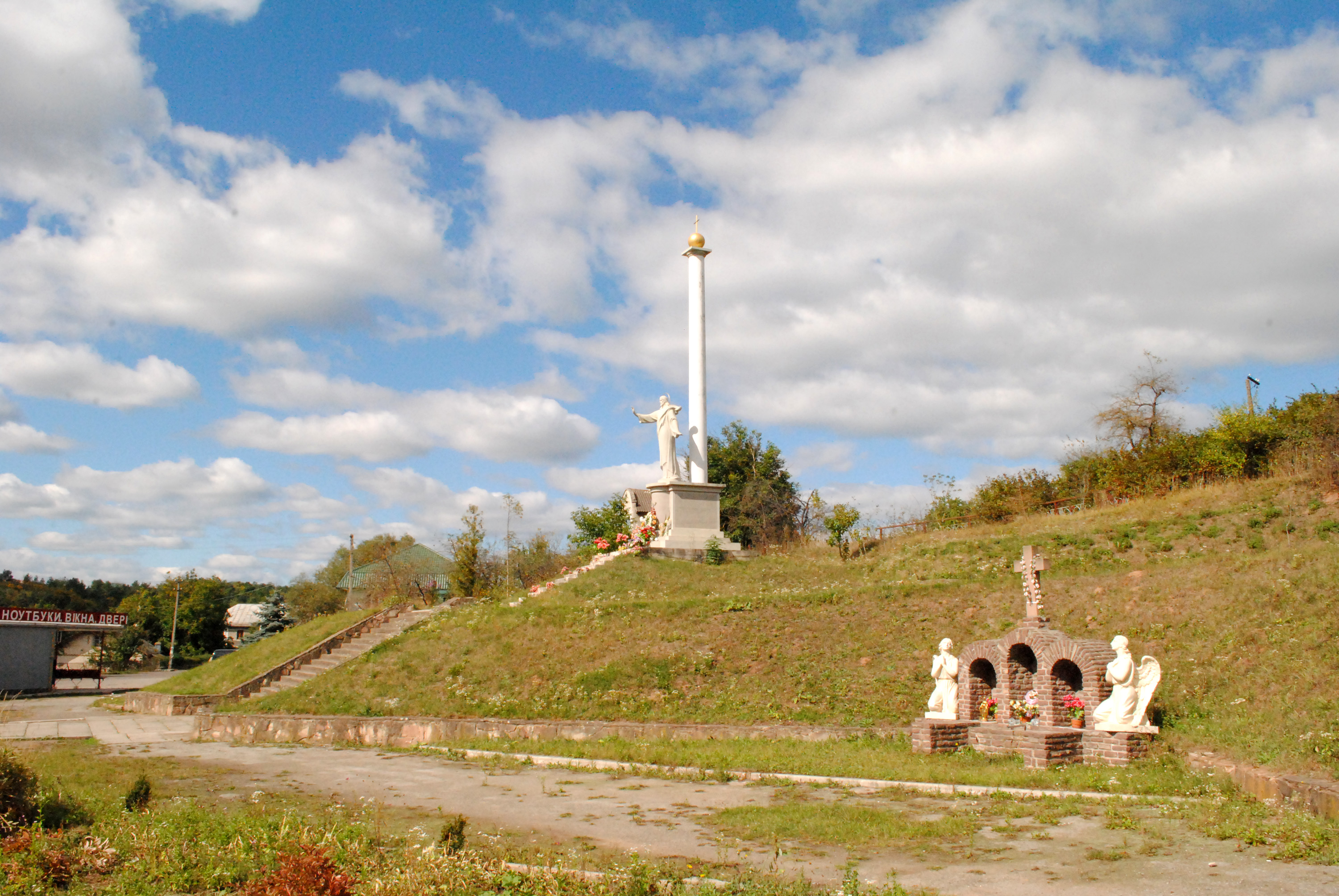 Монумент Христові-Спасителю (Бучач) в Бучачі Тернопільської області на роздоріжжі вулиць генерала Шухевича і Грушевського, т. зв. Чортківському роздоріжжі. Автор — Роман Вільгушинський.